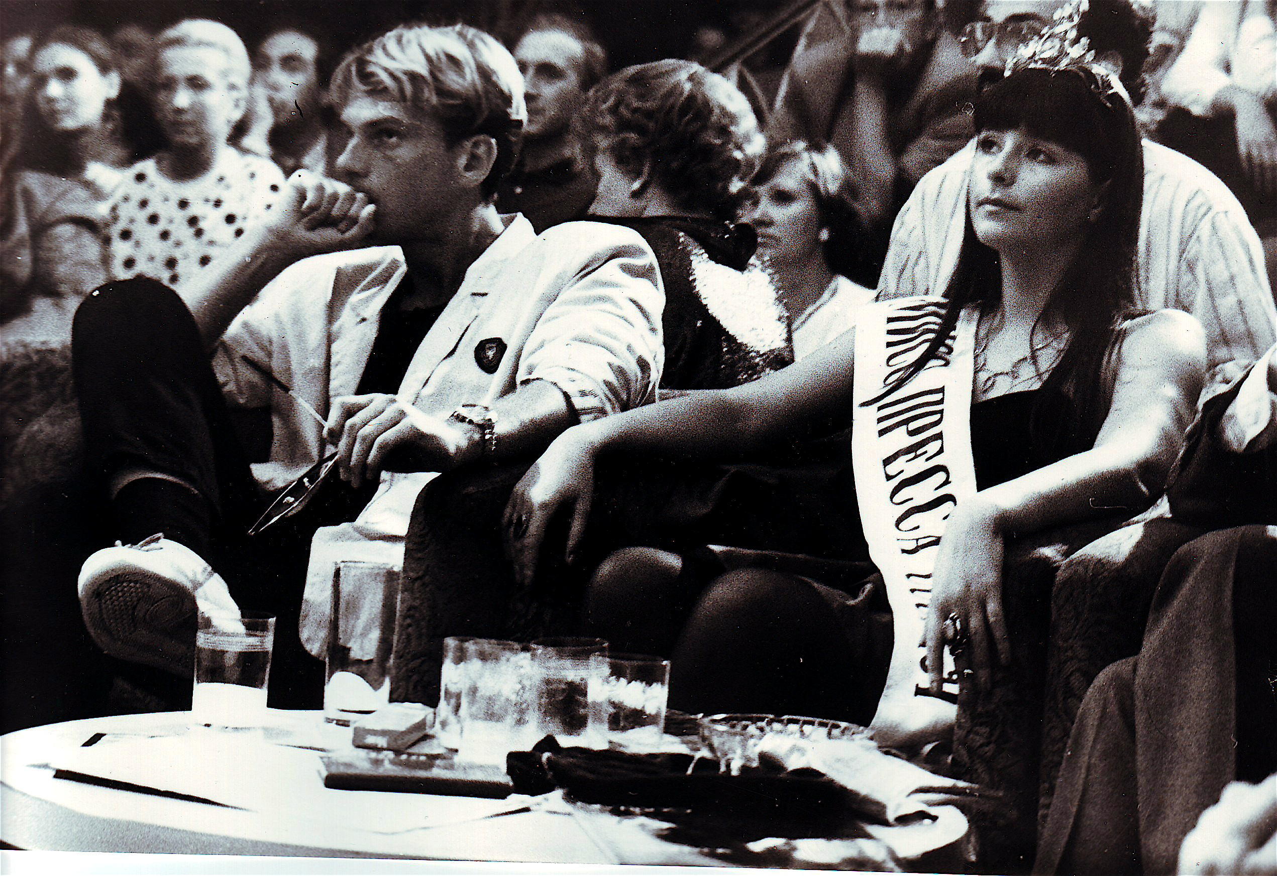 Мисс Пресса (жюри)